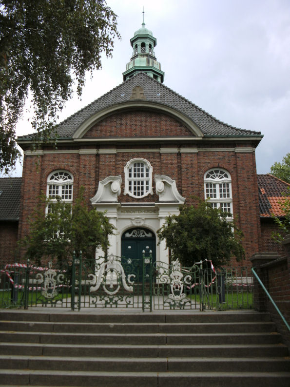 Mennonitenkirche zu Hamburg und Altona, Hamburg, Deutschland